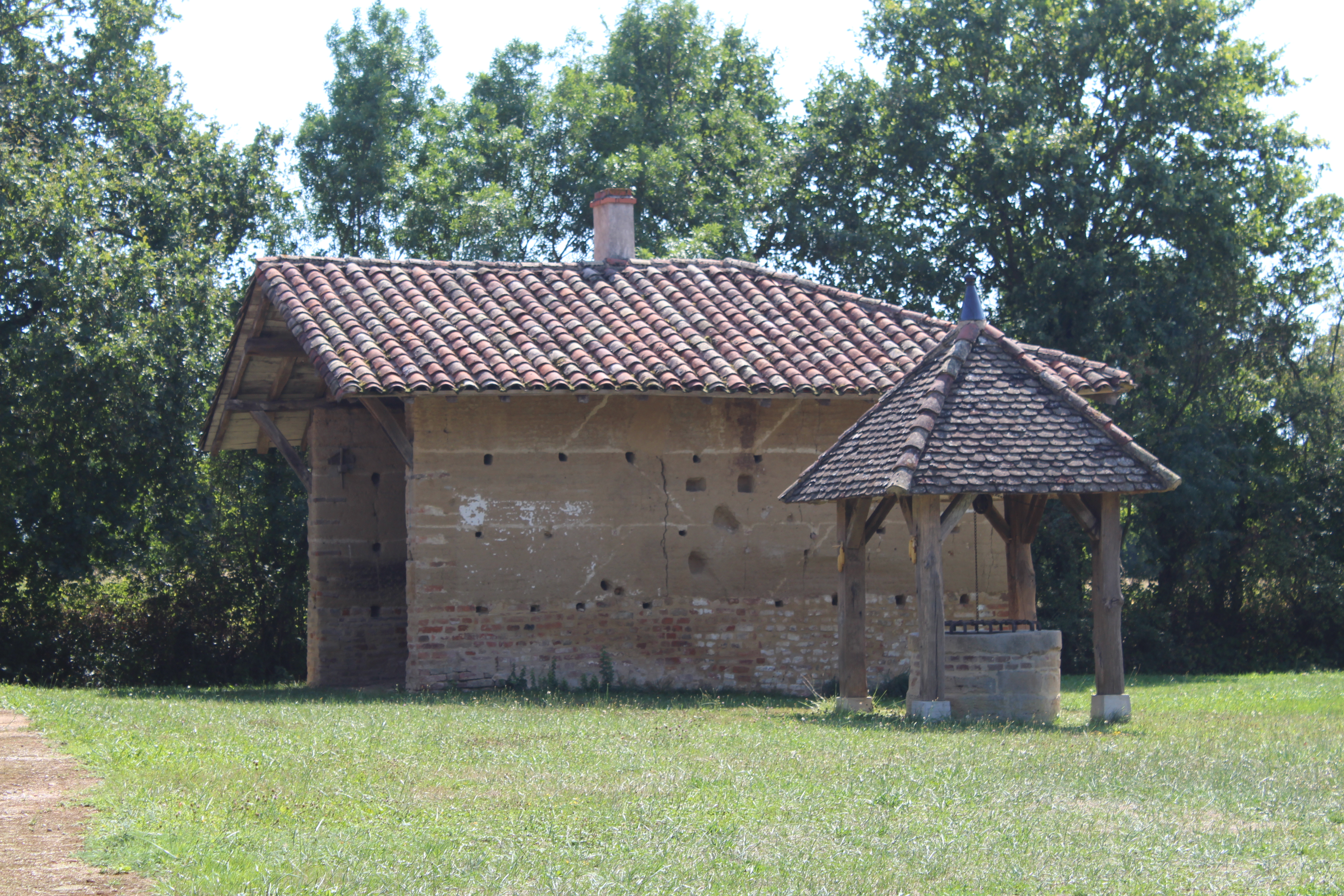 Four et puits de la ferme de la Grange du Clou, Saint-Cyr-sur-Menthon.